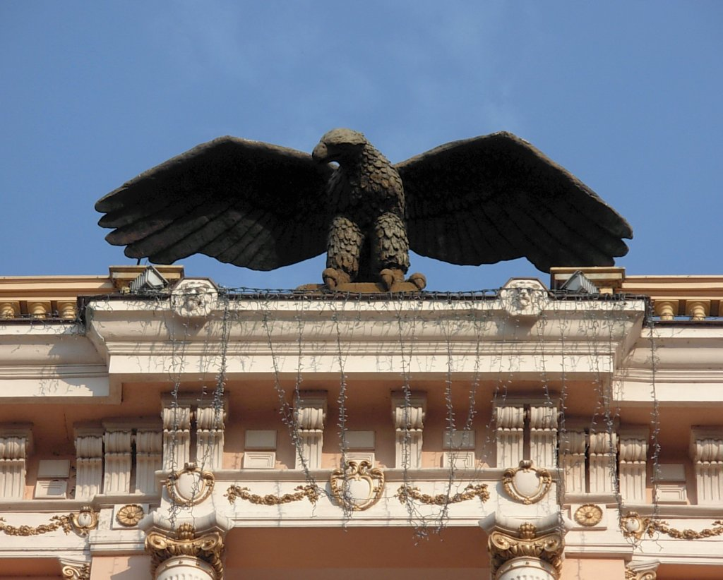 Hotel Pod Orłem w Bydgoszczy